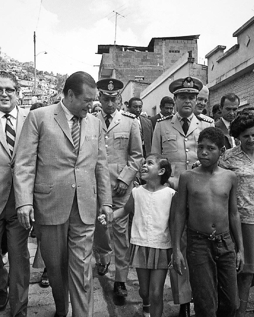 Visita del presidente Rafael Caldera al barrio Macarao.